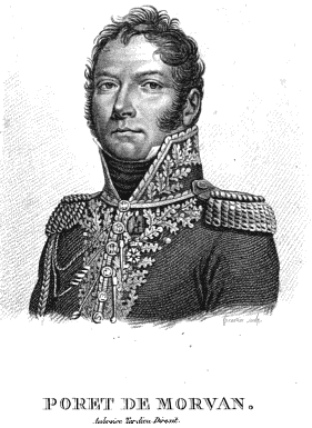 Général_Paul_Poret_de_Morvan